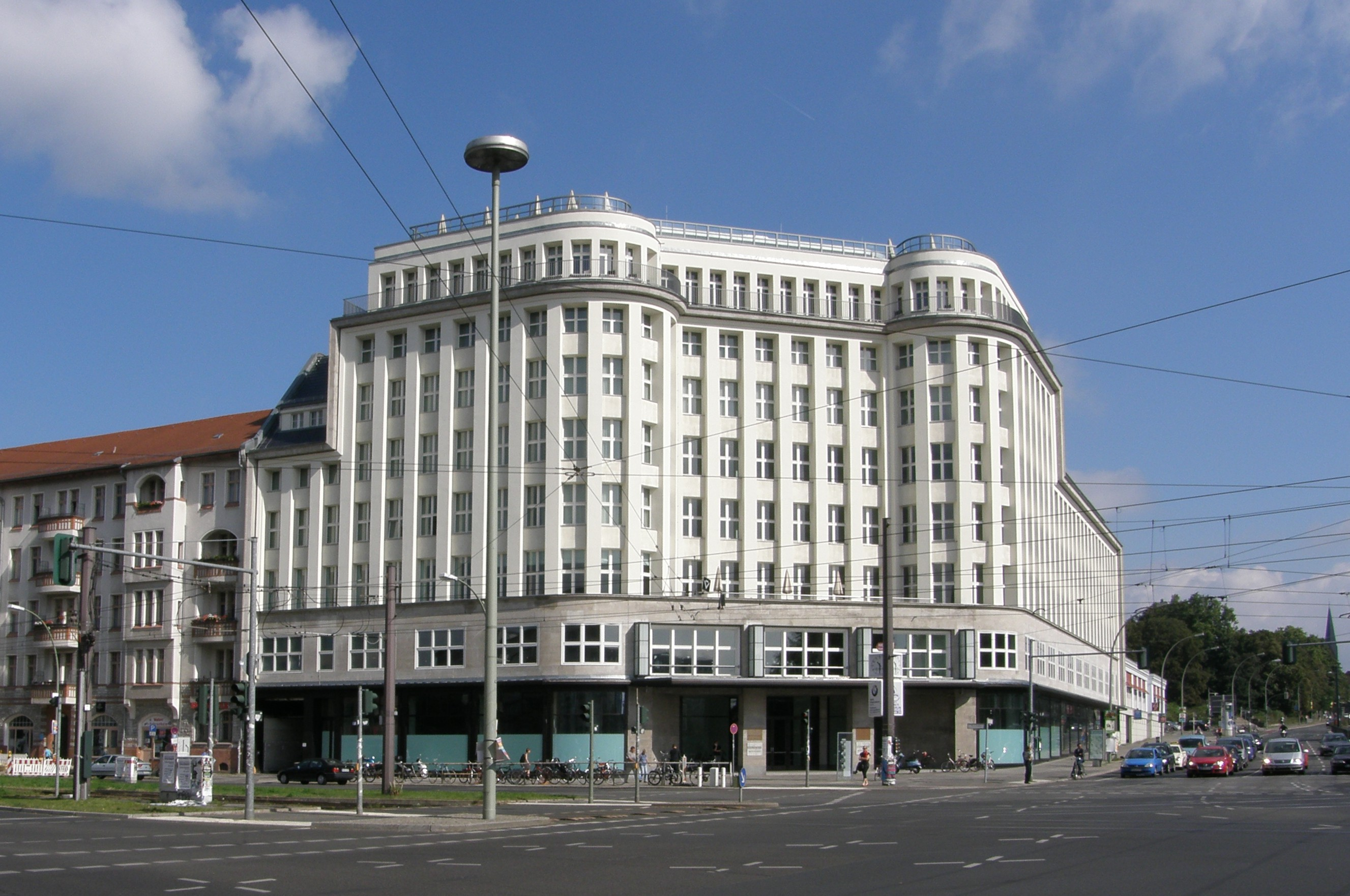 Prenzlauer Berg, eh. Kaufhaus Jonaß, heute Soho House Berlin